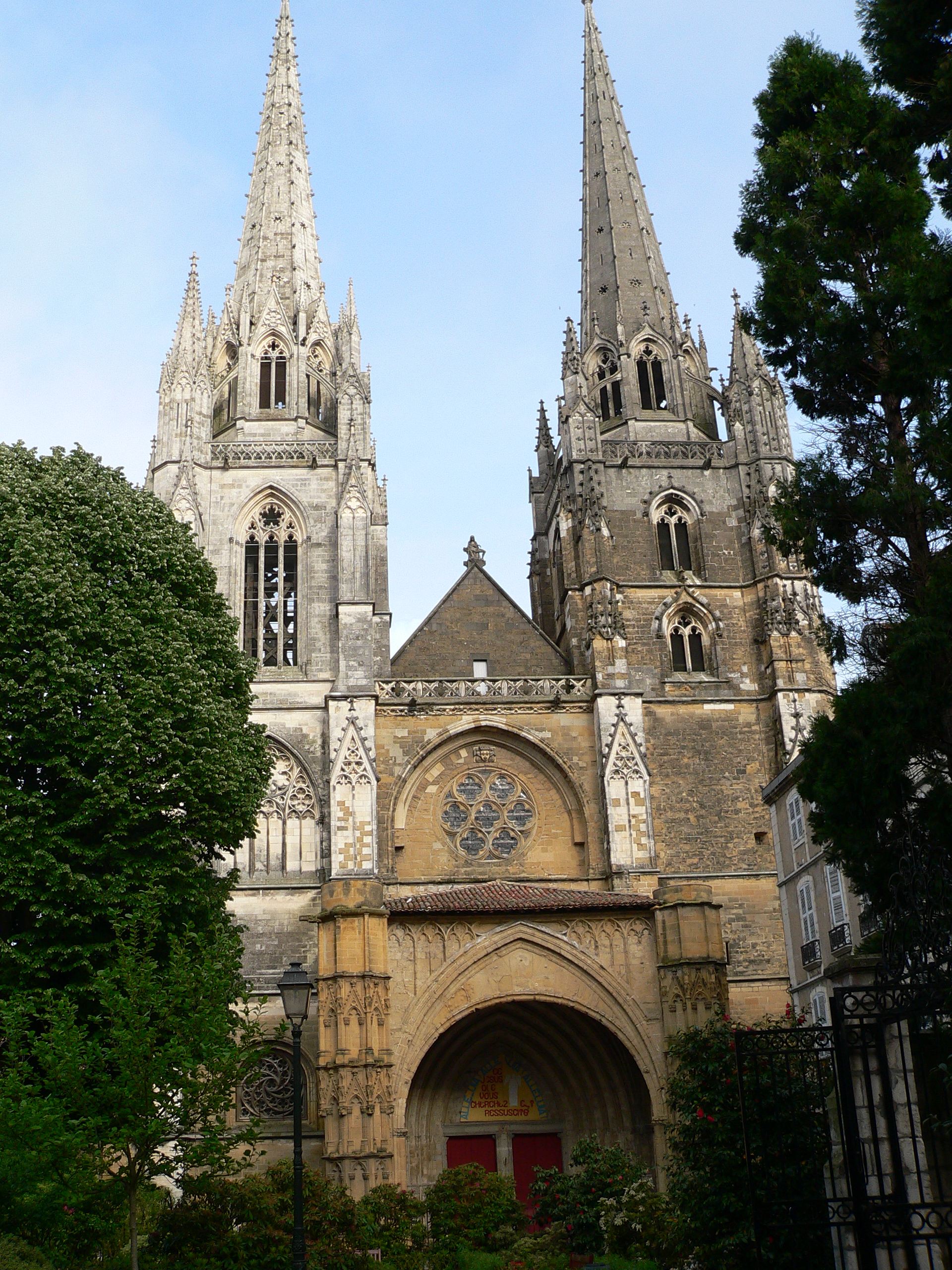 Fachada de la catedral Description: Cathedral Place: Bayonne Country: France Photographer: © Manuel González Olaechea y Franco Shot date : March 30th, 2005